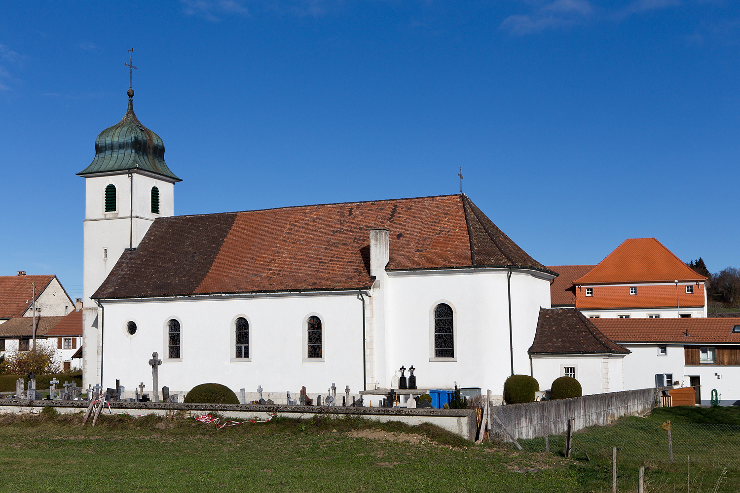 Kirche in Pleigne (JU)